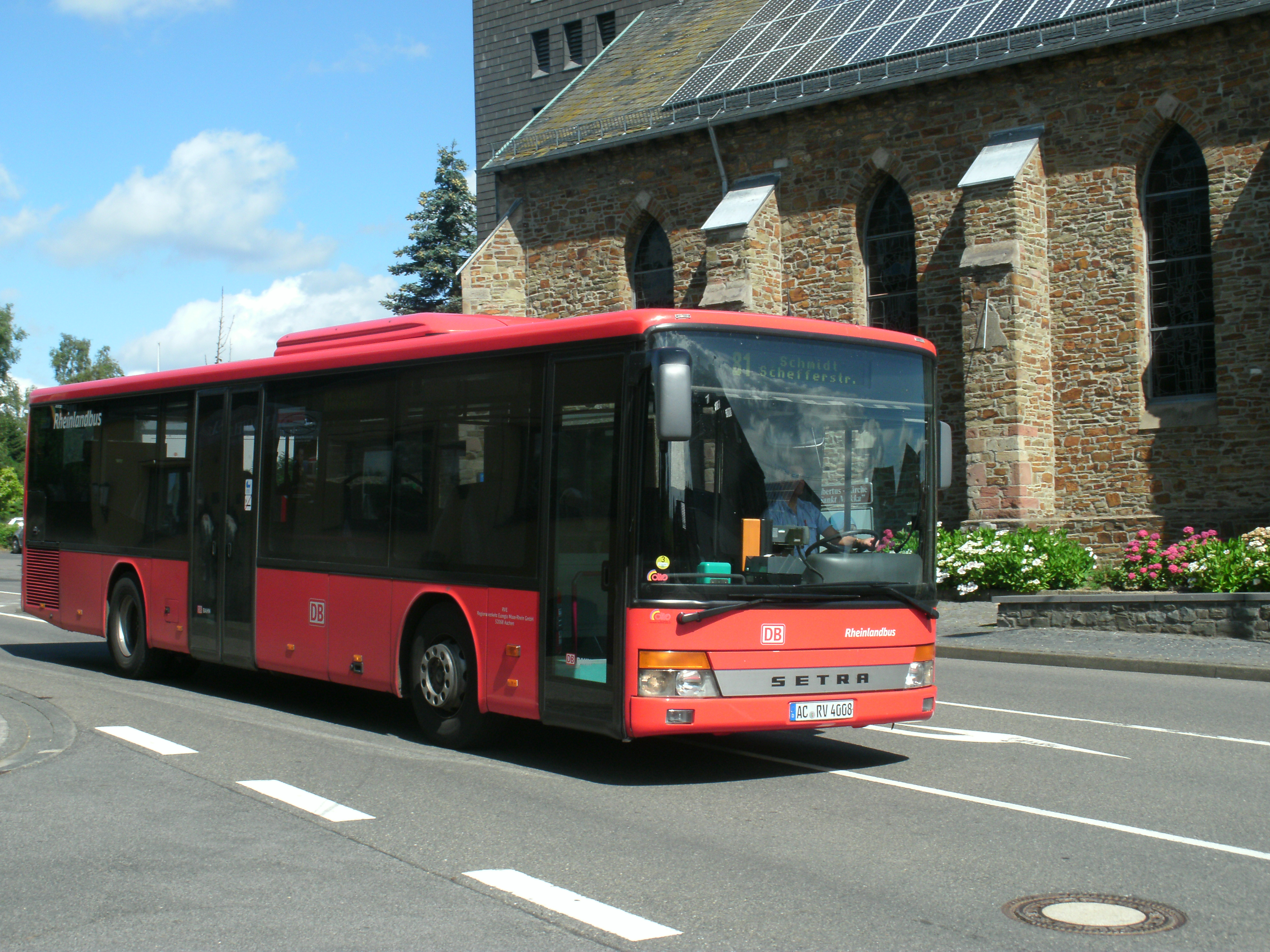 Ein Setra-Überlandlinienbus der DB Regionalverkehr Euregio Maas-Rhein (Rheinlandbus) als Linie 81 in Nideggen-Schmidt kurz vor der Haltestelle Schule